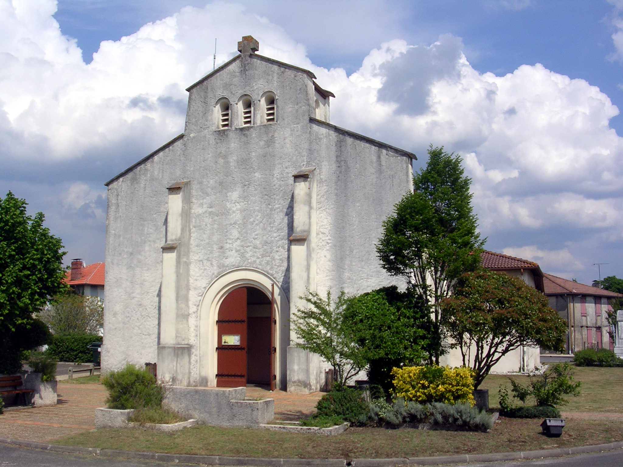 Façade de l'église Sainte-Eulalie à Sainte-Eulalie-en-Born, Landes, France